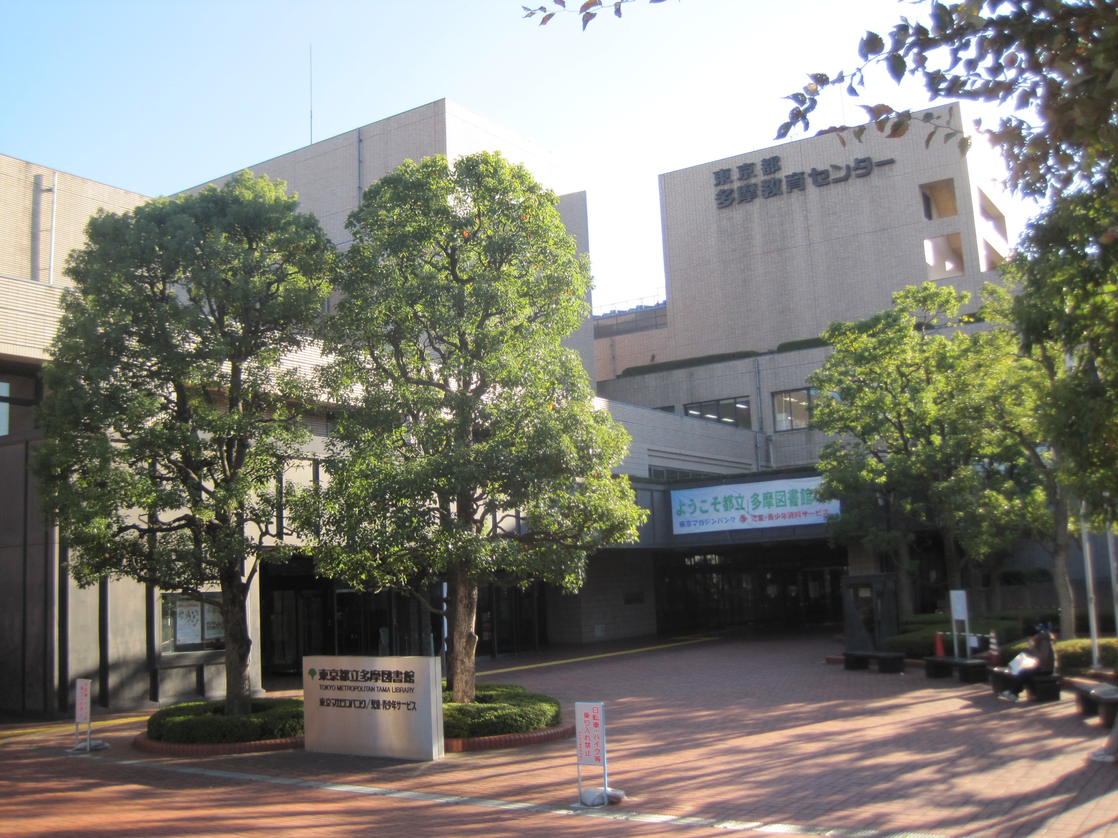 立川市の東京都立多摩図書館。